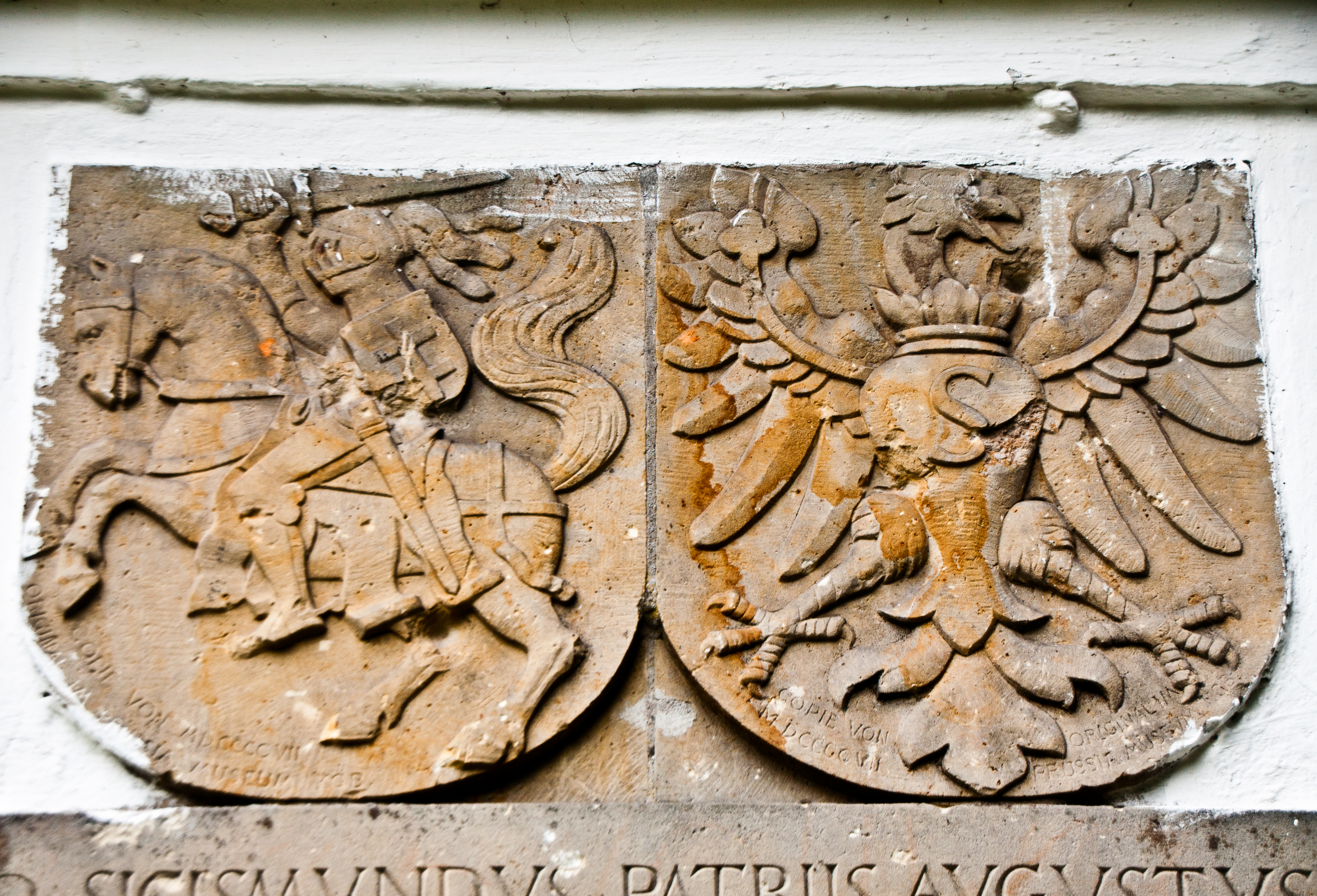 Bogusze - herby Wielkiego Księstwa Litewskiego i Prus Książęcych ma historycznym słupie granicznym (zabytek nr A-586 z dn. 29.12.1964)